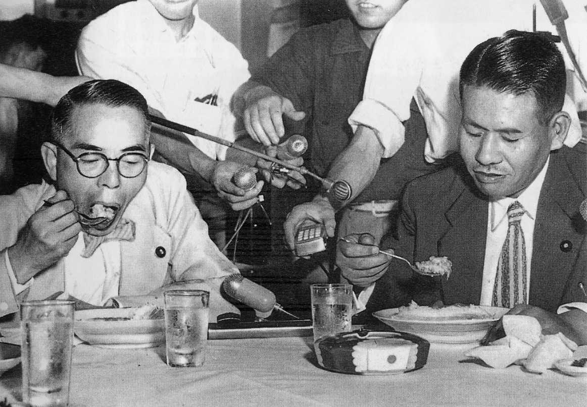 黄変米を食べる草葉隆円厚生大臣